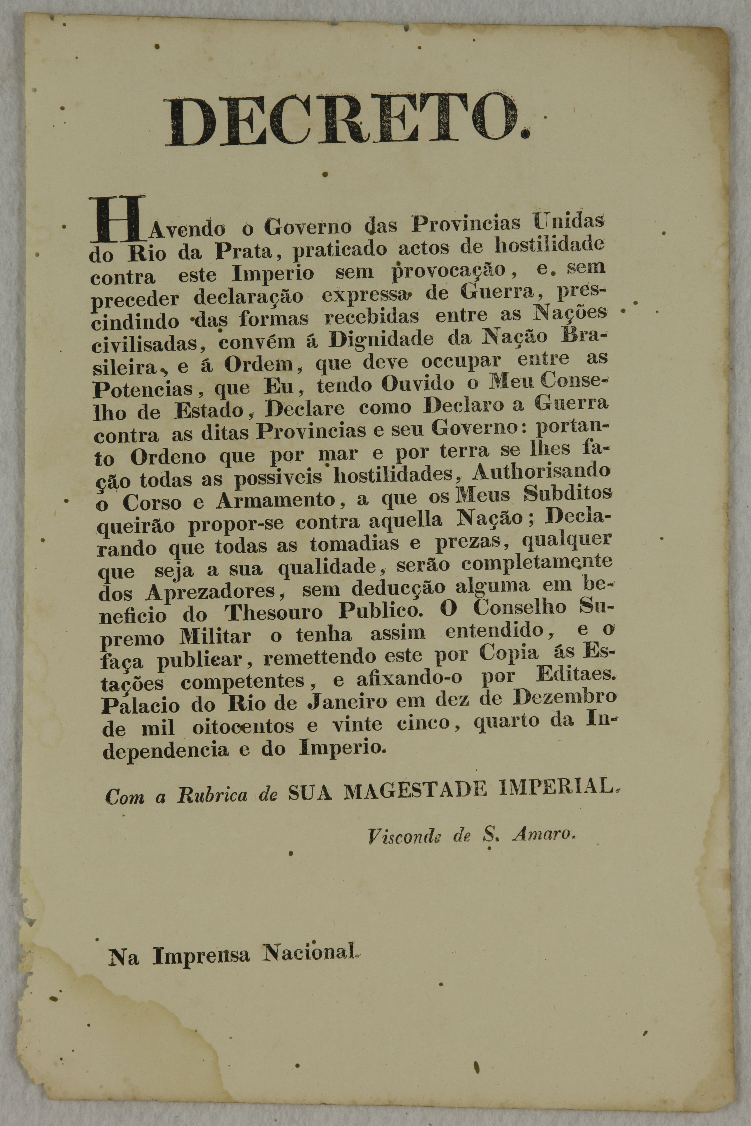 Decreto, em que o Imperador Dom Pedro I, oficializa a Declaração de Guerra contra as Províncias Unidas do Rio da Prata em 10 de dezembro de 1825.